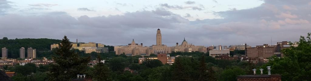 Uniwersytet Montrealski widziany z Ville Mont-Royal